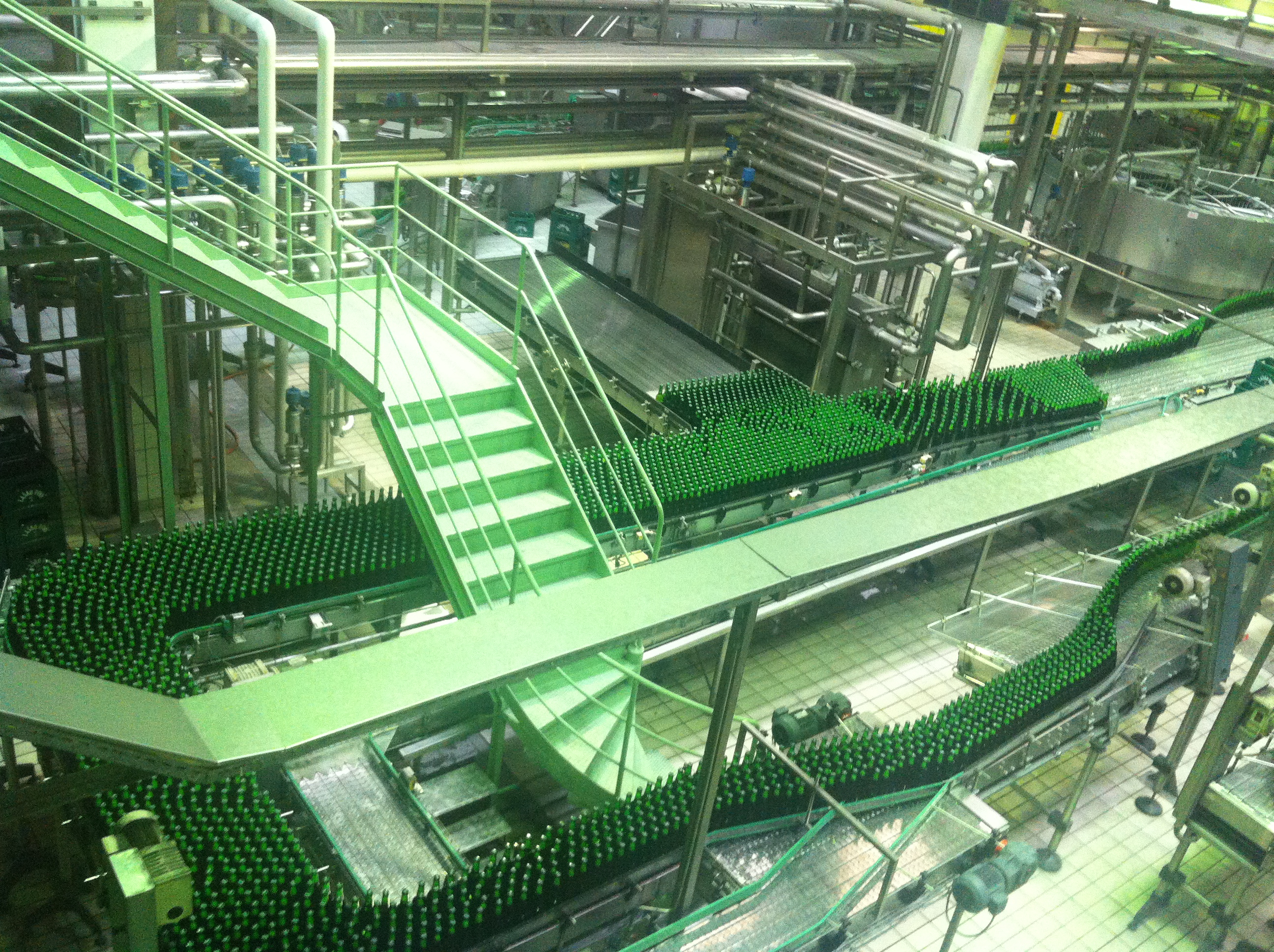 Besichtigung Brauerei Laško Brewery (Slovenisch: Pivovarna Laško) der größten Brauerei Sloveniens.